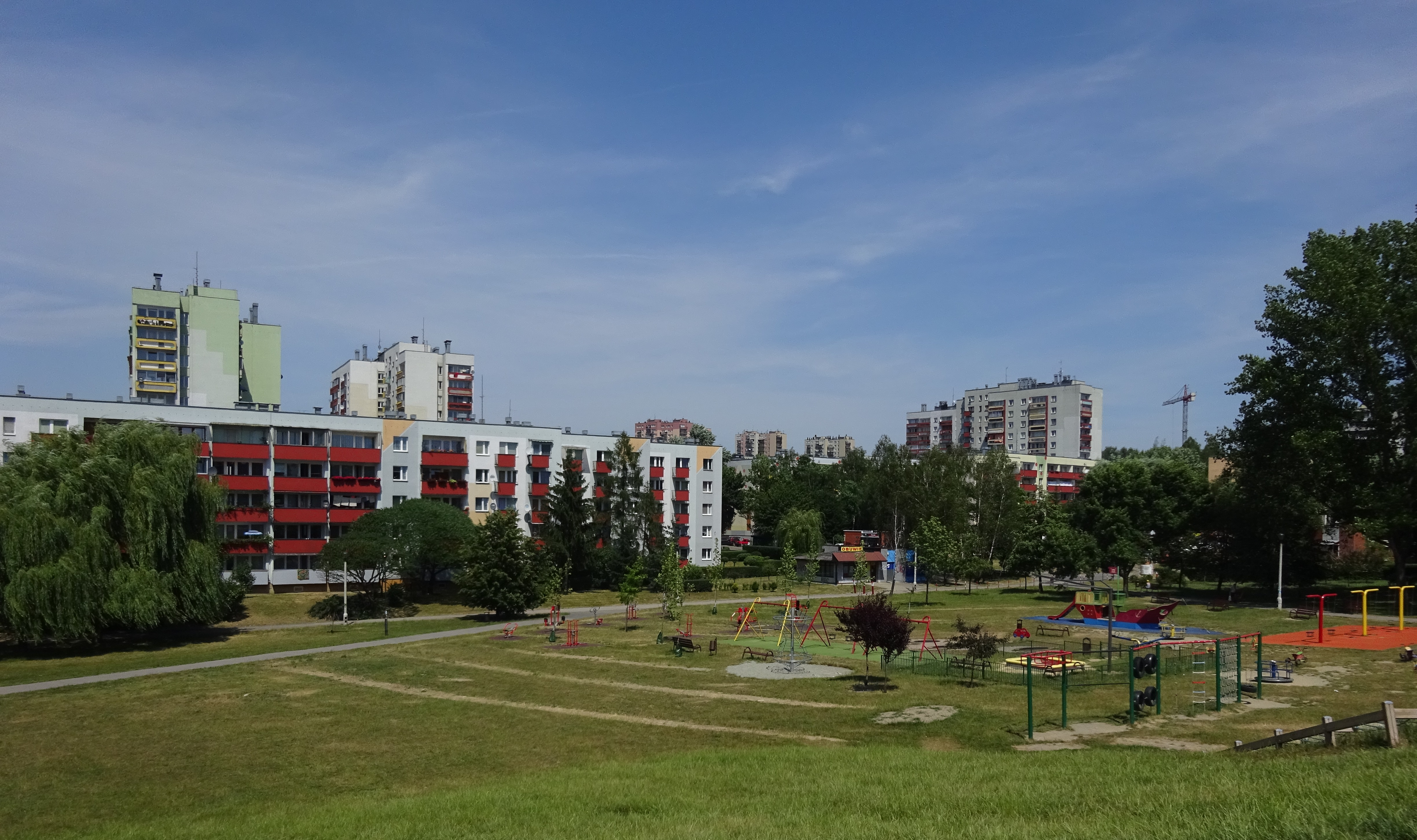 Park Kurdwanowski w Krakowie na osiedlu Kurdwanów Nowy. Widok środkowej części parku w kierunku północno-wschodnim. 2019